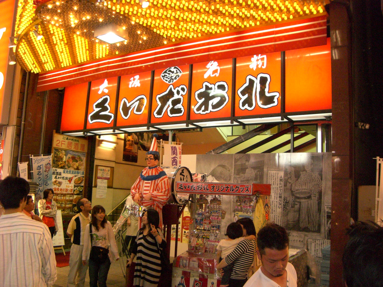 Kuidaore